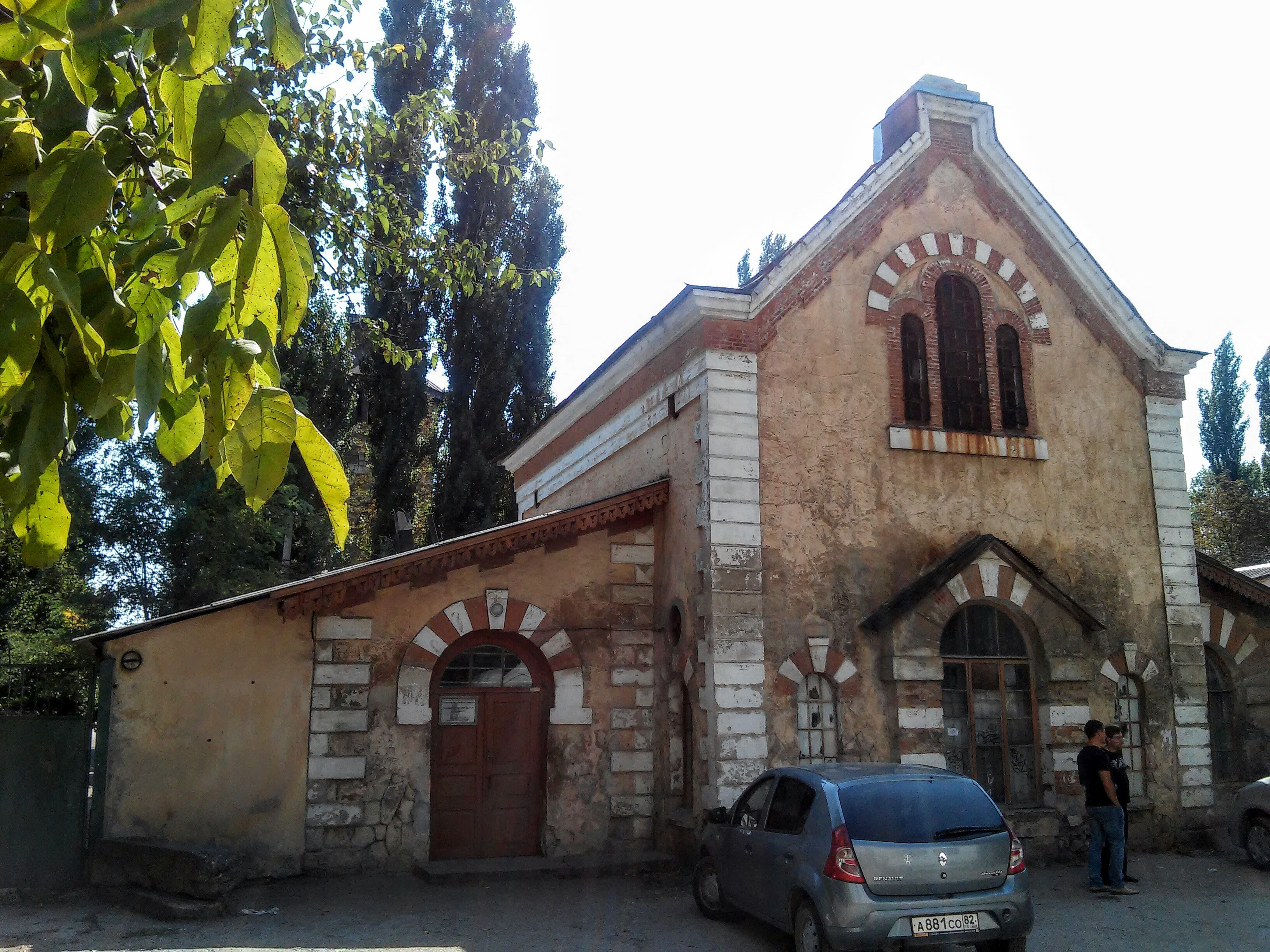 Часовня: улица А. Невского, 27, литер "1Д", Симферополь, Крым This object is located on the Crimean Peninsula and recognized as cultural heritage by Russia under the monument ID: 8231046000. The legal status of the Crimean region is currently disputed.